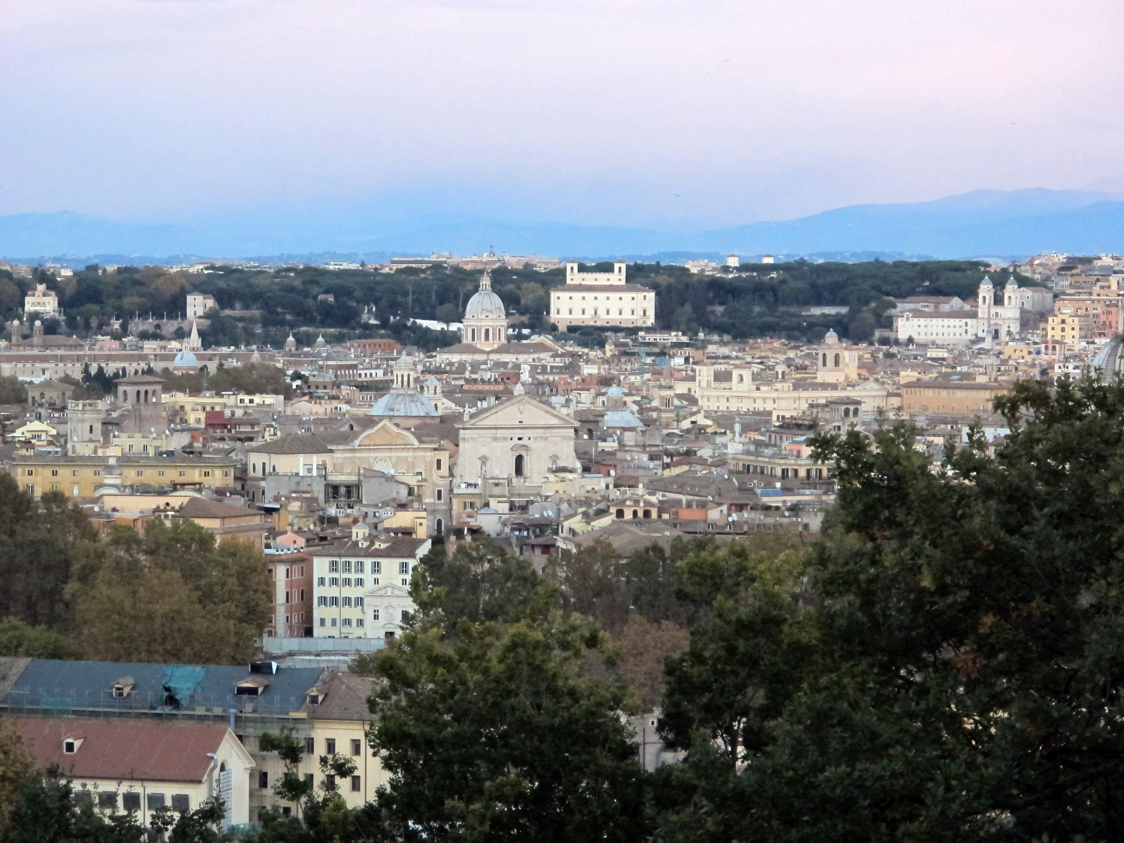 Roma, vedi titolo